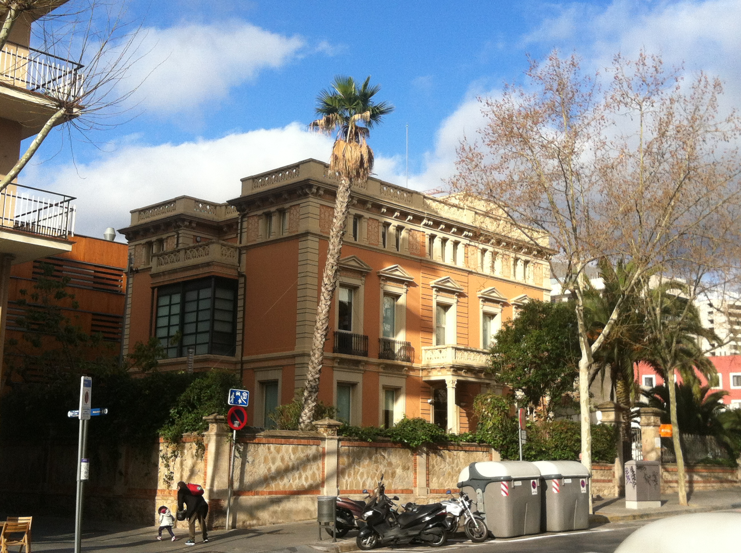 Fundació Pere Tarrés